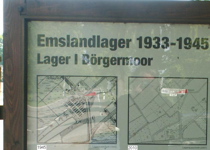 Kamp Borgermoor 1